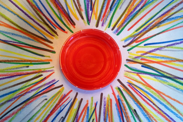 una tapa rodeada de lineas de colores que expresa el poder que tiene una tapa.